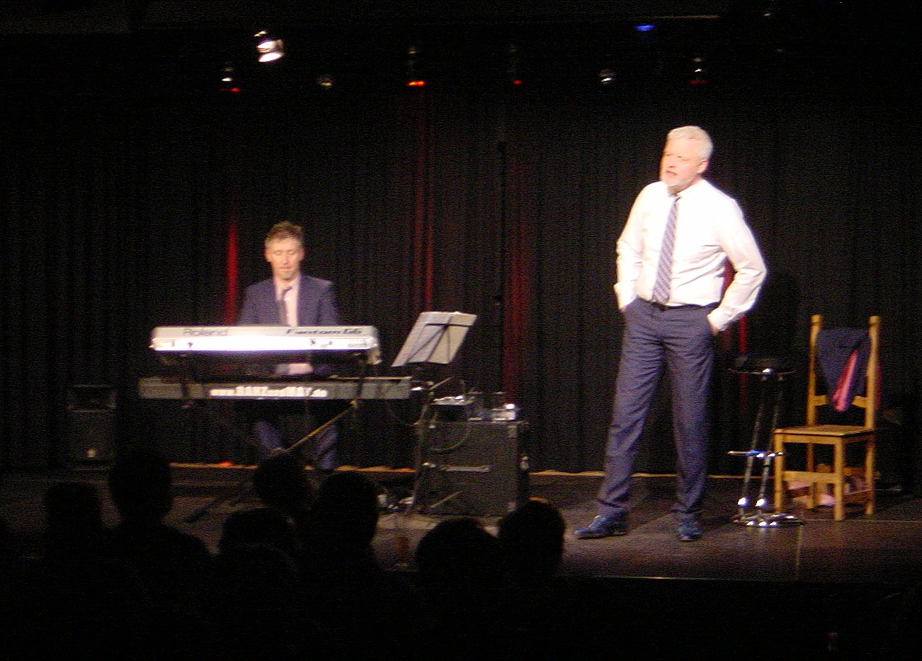 Ranz & May, Kabarettisten, in Pirna beim Q24 in der Kleinkunstbühne